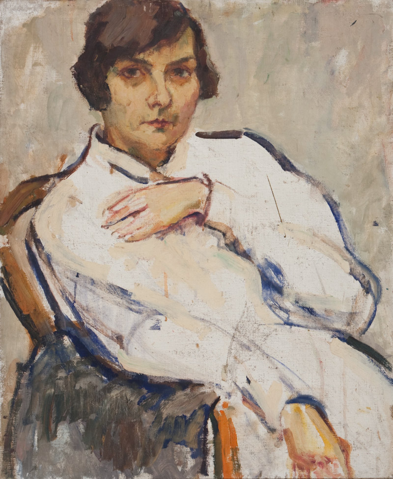 Daisy Campi, Selbstportrait, um 1925, Öl auf Leinwand, 82,5x68 cm